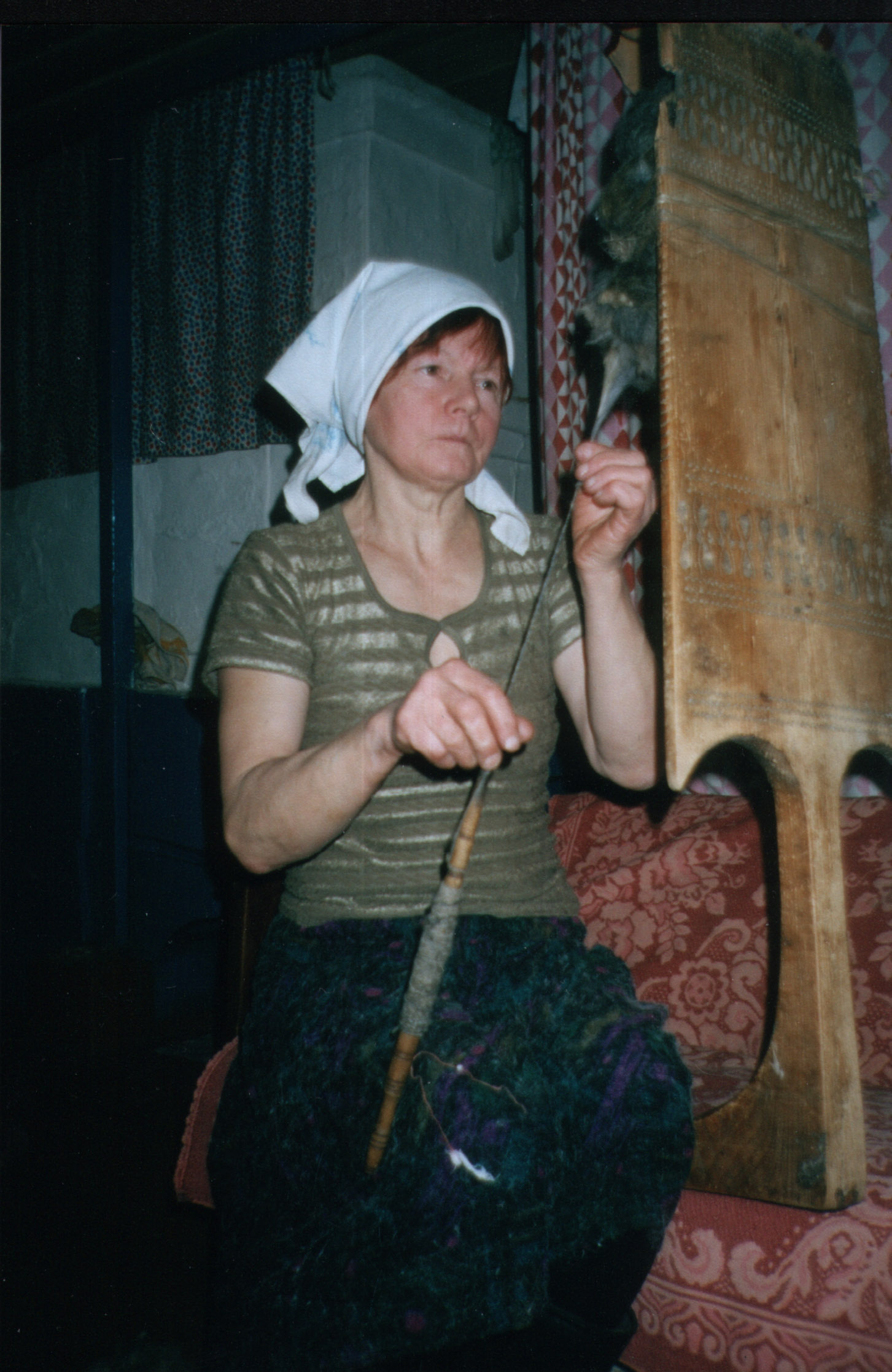 за прялкой (д. Логдуз, Бабушкинский район, Вологодская область, 2005 год)